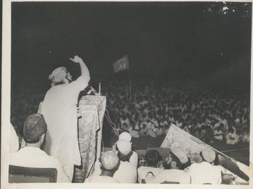 مولانا اوكاروي